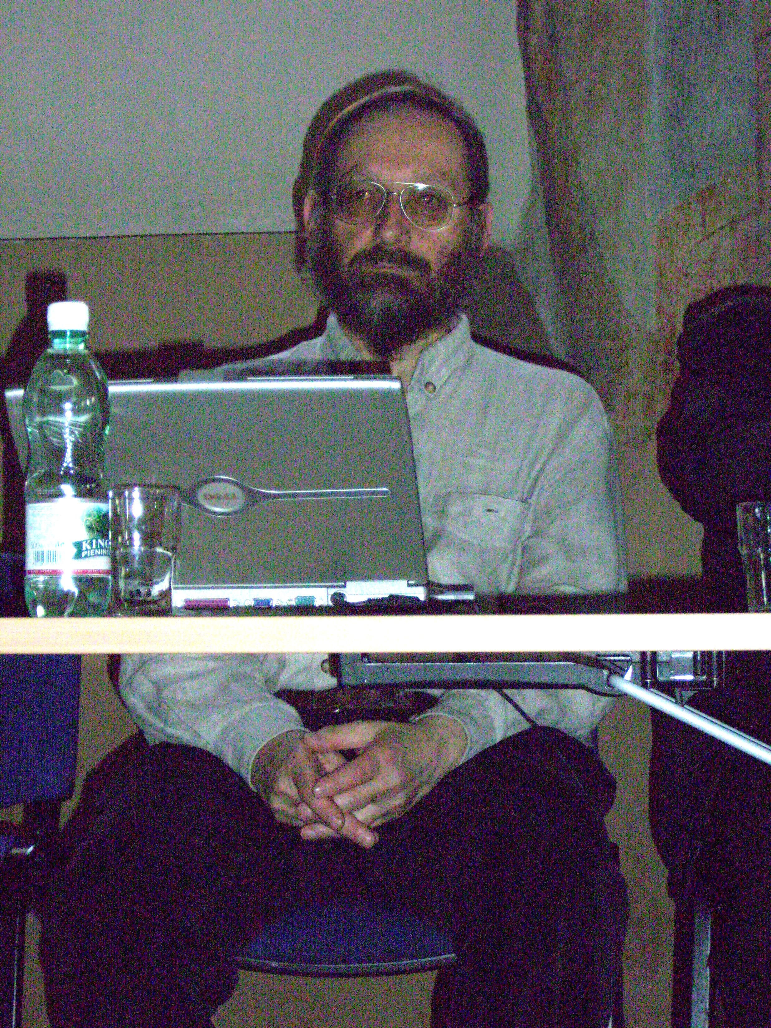 Stanisław Krajewski